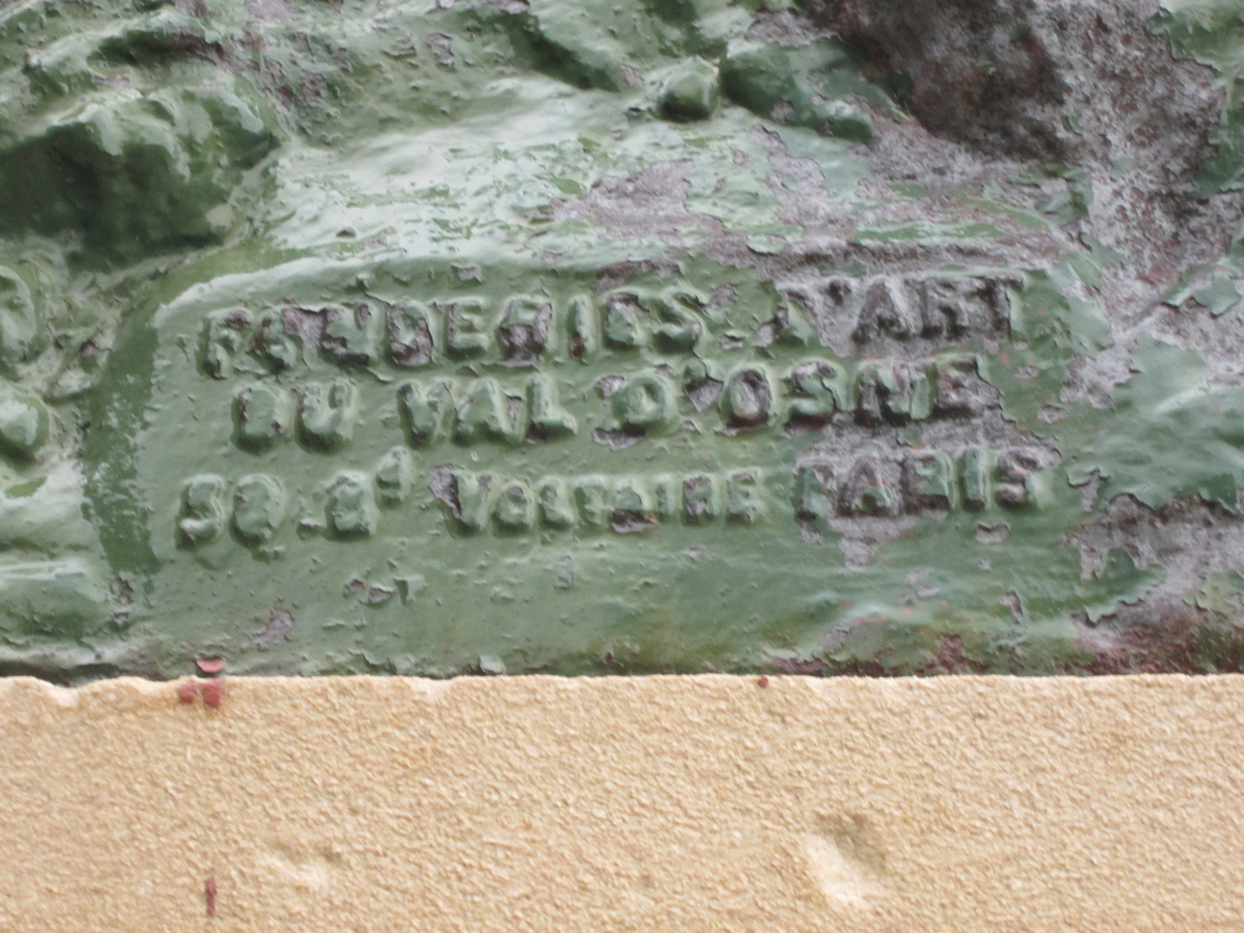 Statue équestre de Jeanne d'Arc